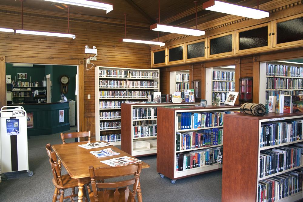 Intérieur de la Bibliothèque commémorative Pettes